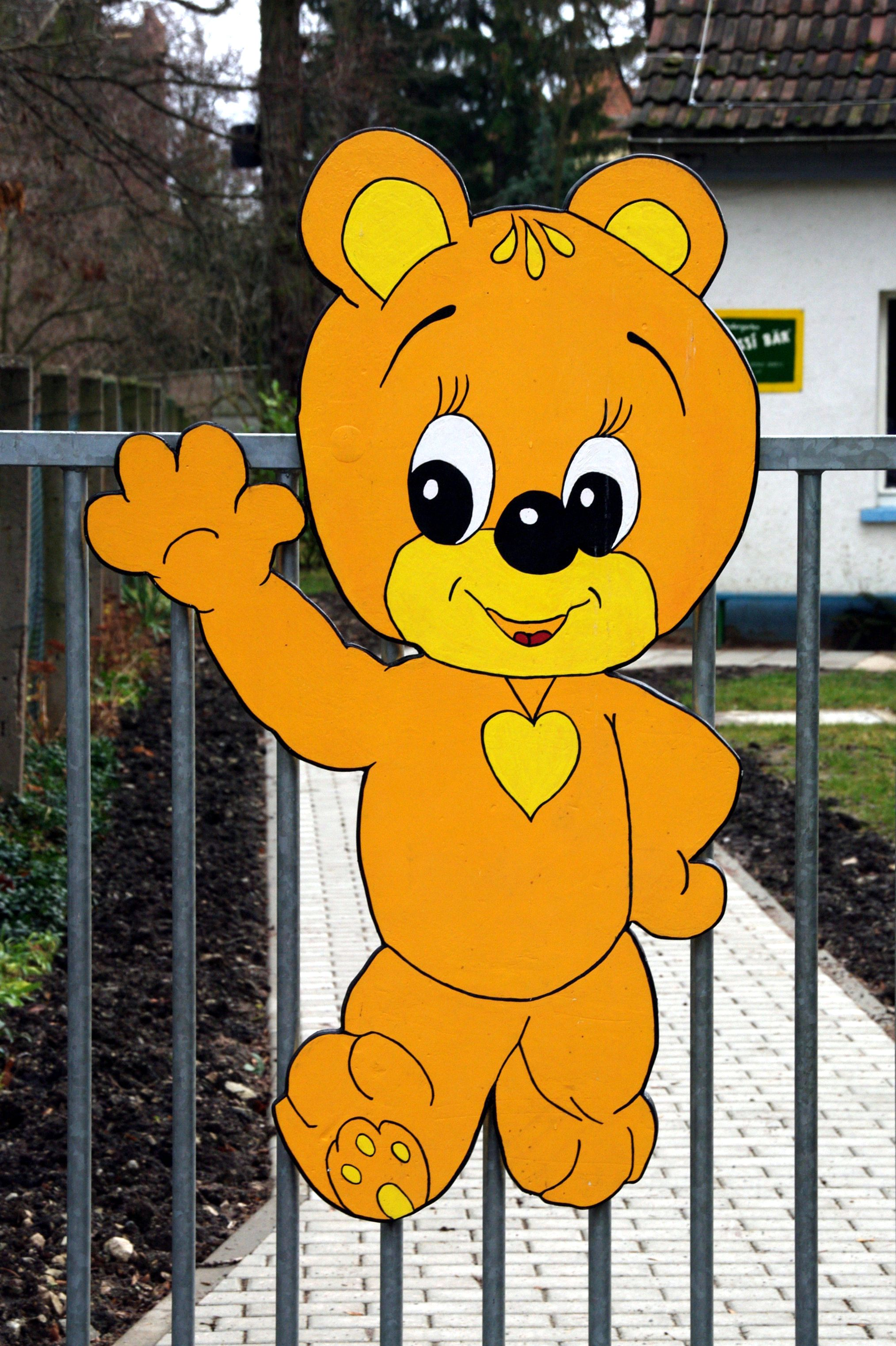 Die Kindertagesstätte "Bussi Bär am Kilianipark in Erfurt-Gispersleben.